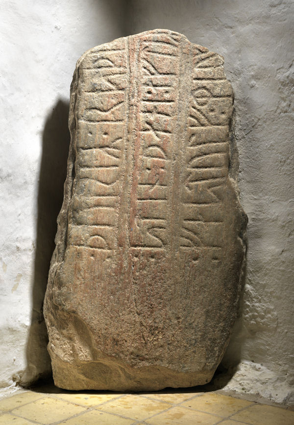 Foto: Nationalmuseet ved Roberto Fortuna